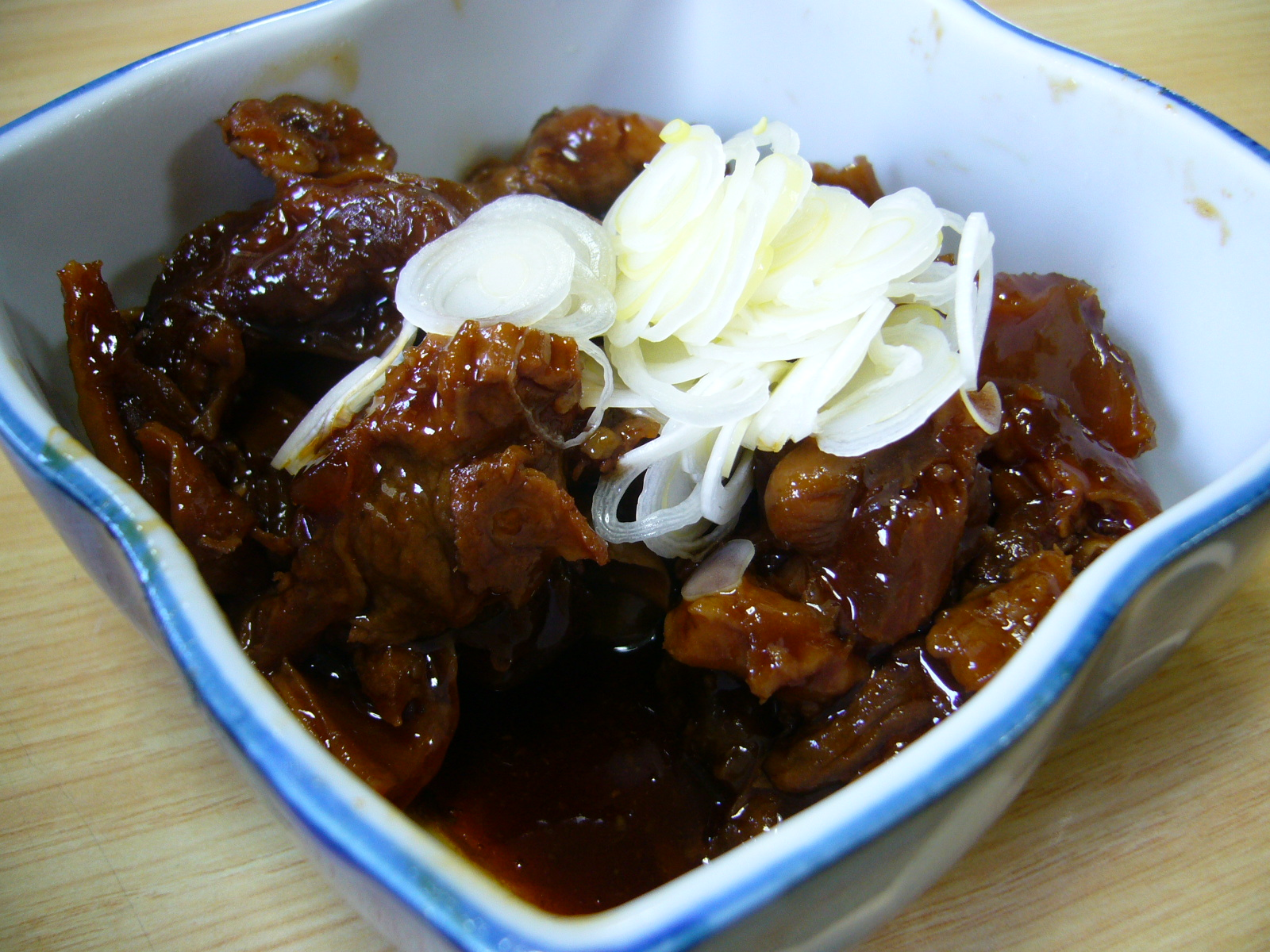 stewed-beef-tendon,gyusuji-nikomi,katori-city,japan